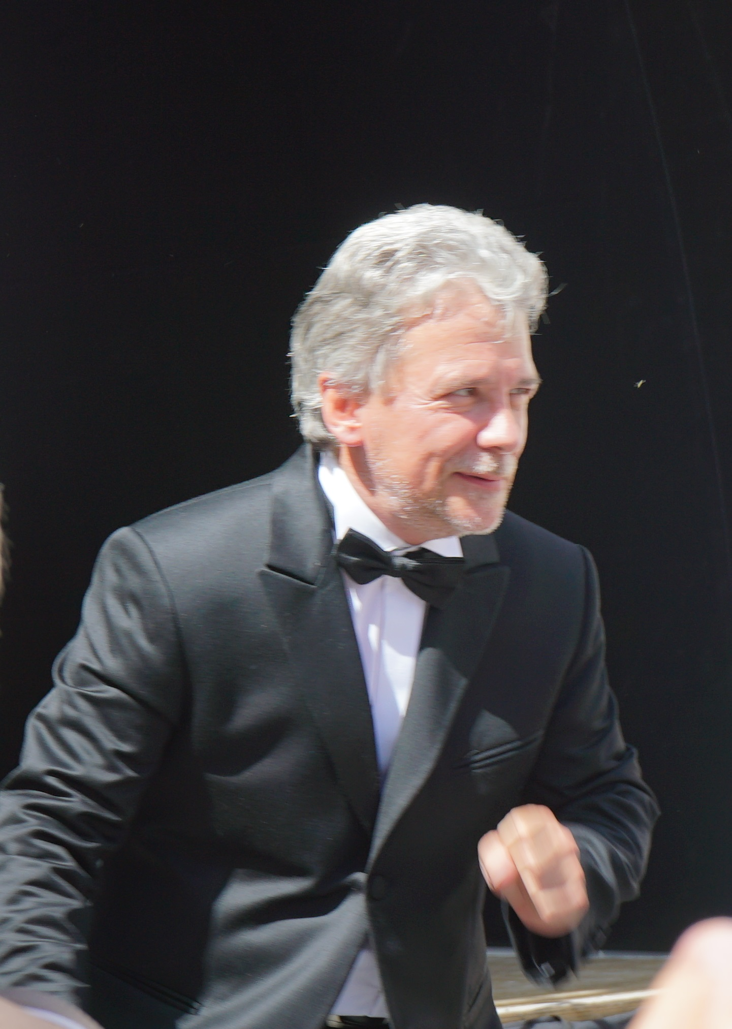 Jean-Paul Fouchécourt lors des Flâneries musicales 2015.